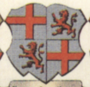 Wappen des Konstanzer Bischofs Konrad von Altdorf